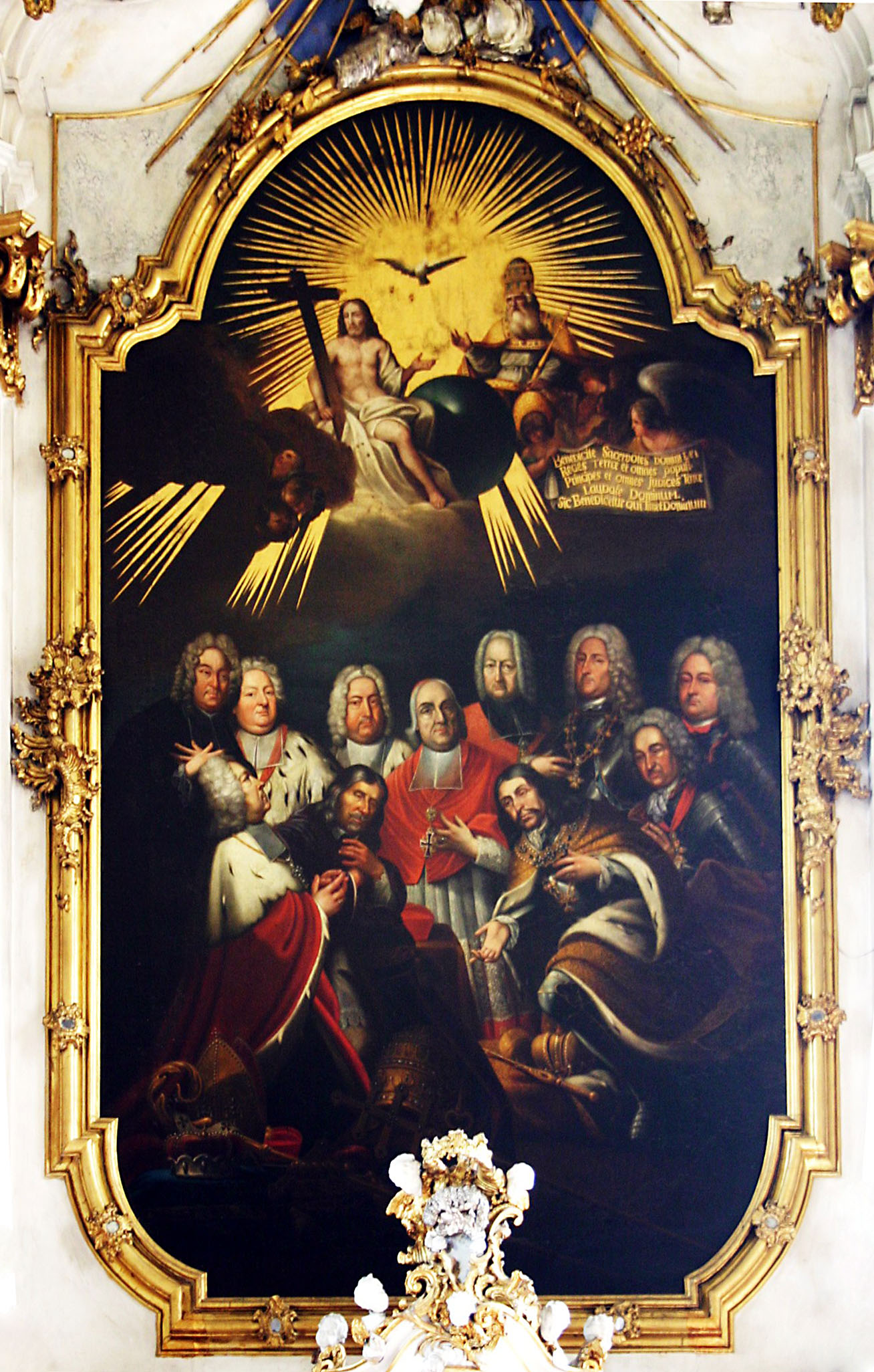 Die drei Generationen des Hauses Schönborns